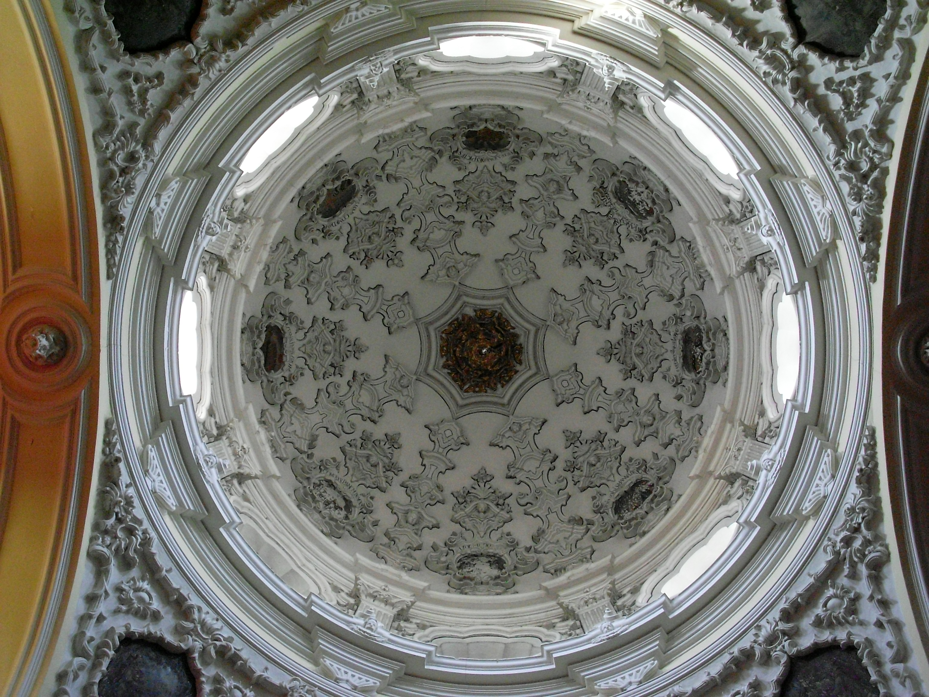 Cúpula de la Capilla sacramental de la Iglesia de Sta Bárbara de Écija.